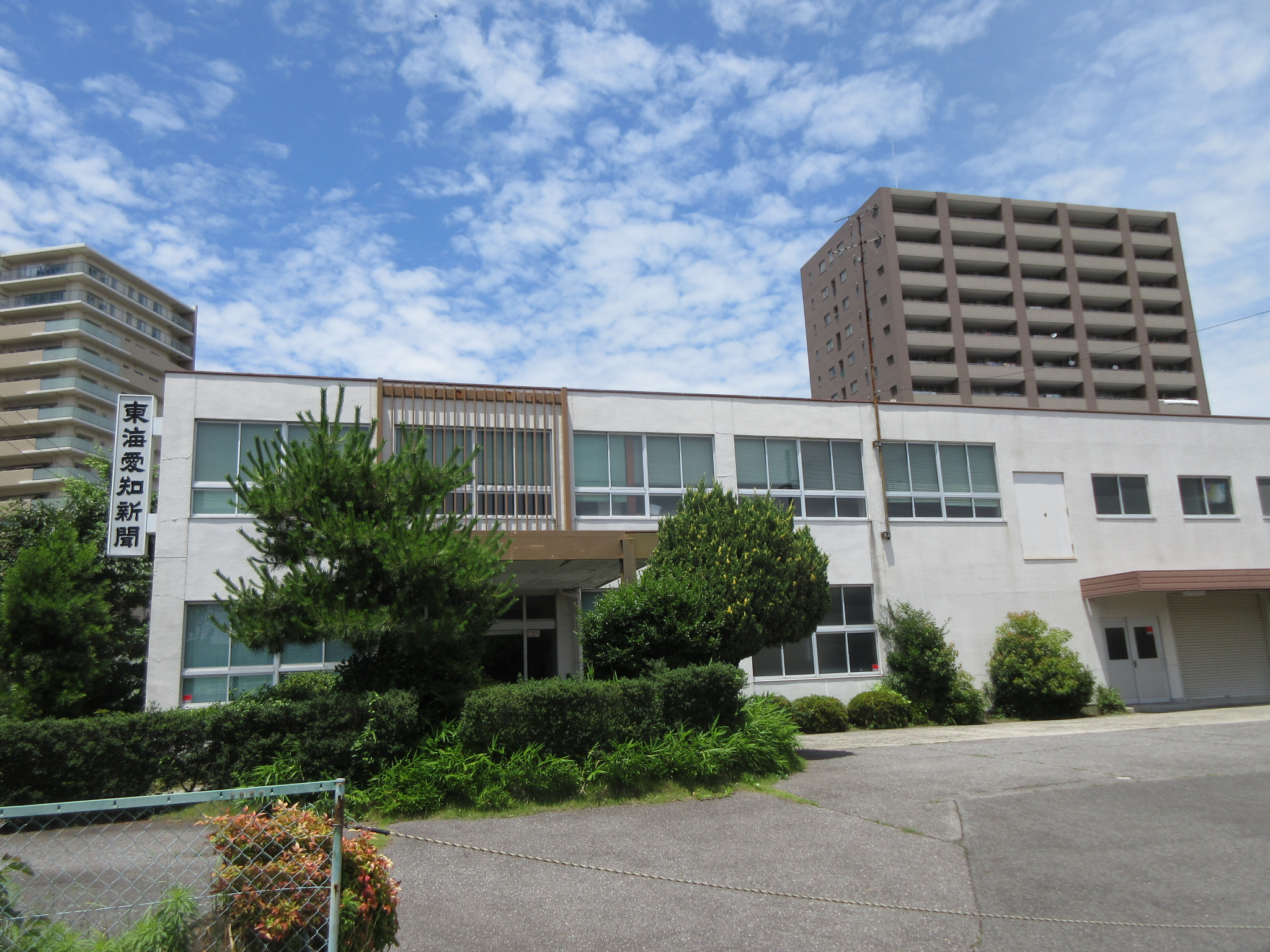 東海愛知新聞社（岡崎市南明大寺町）